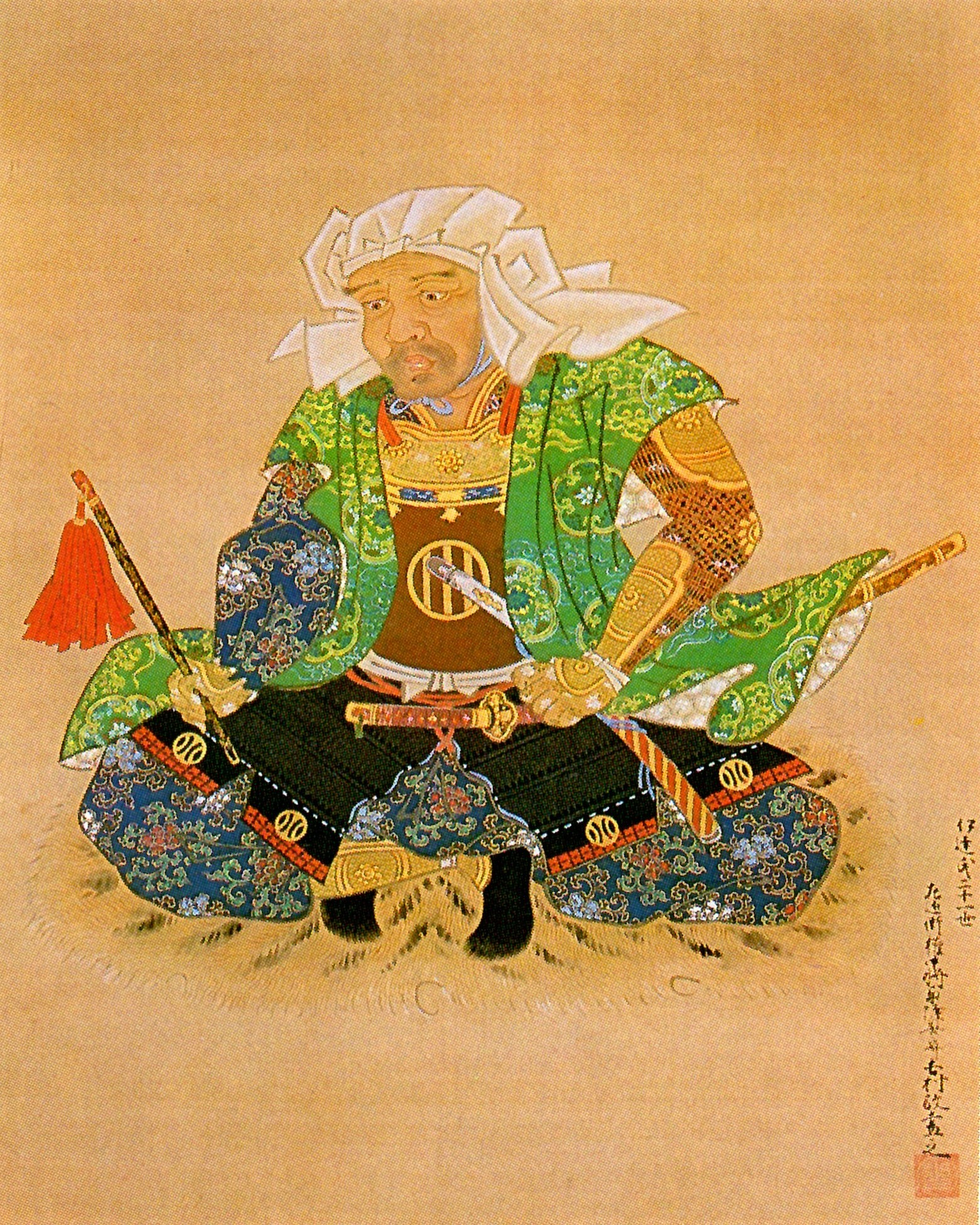 伊達朝宗の肖像。